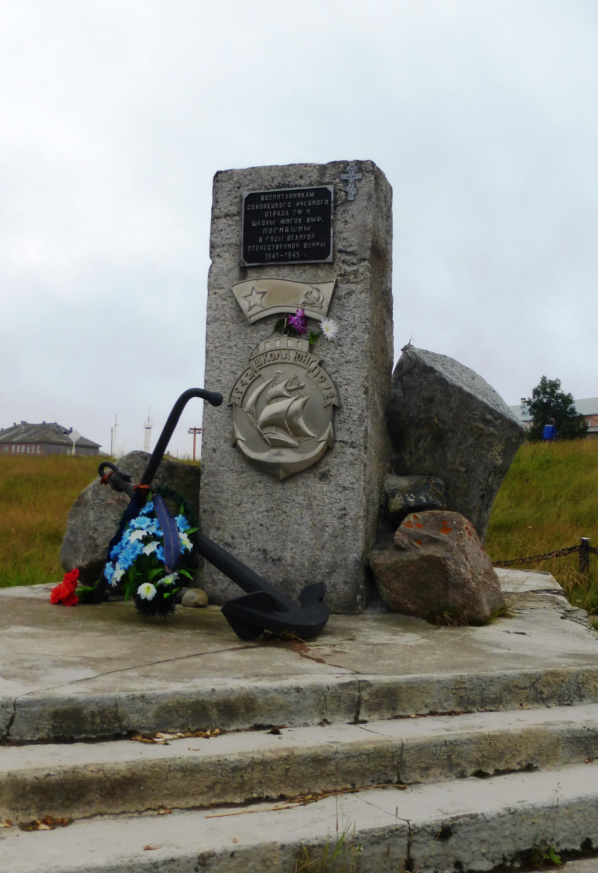 Памятник на б.Соловецком острове (пос.Соловецкий)